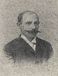 Zikmund Reach